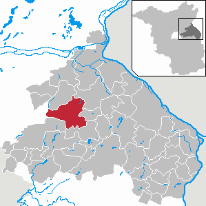 Prötzel in Brandenburg (Country) - District Märkisch-Oderland